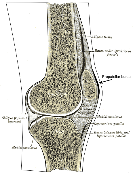 Prepatellar bursa